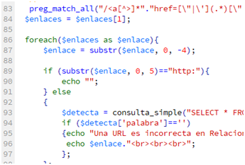 Goi-mailako programazio-lengoaiaren adibidea